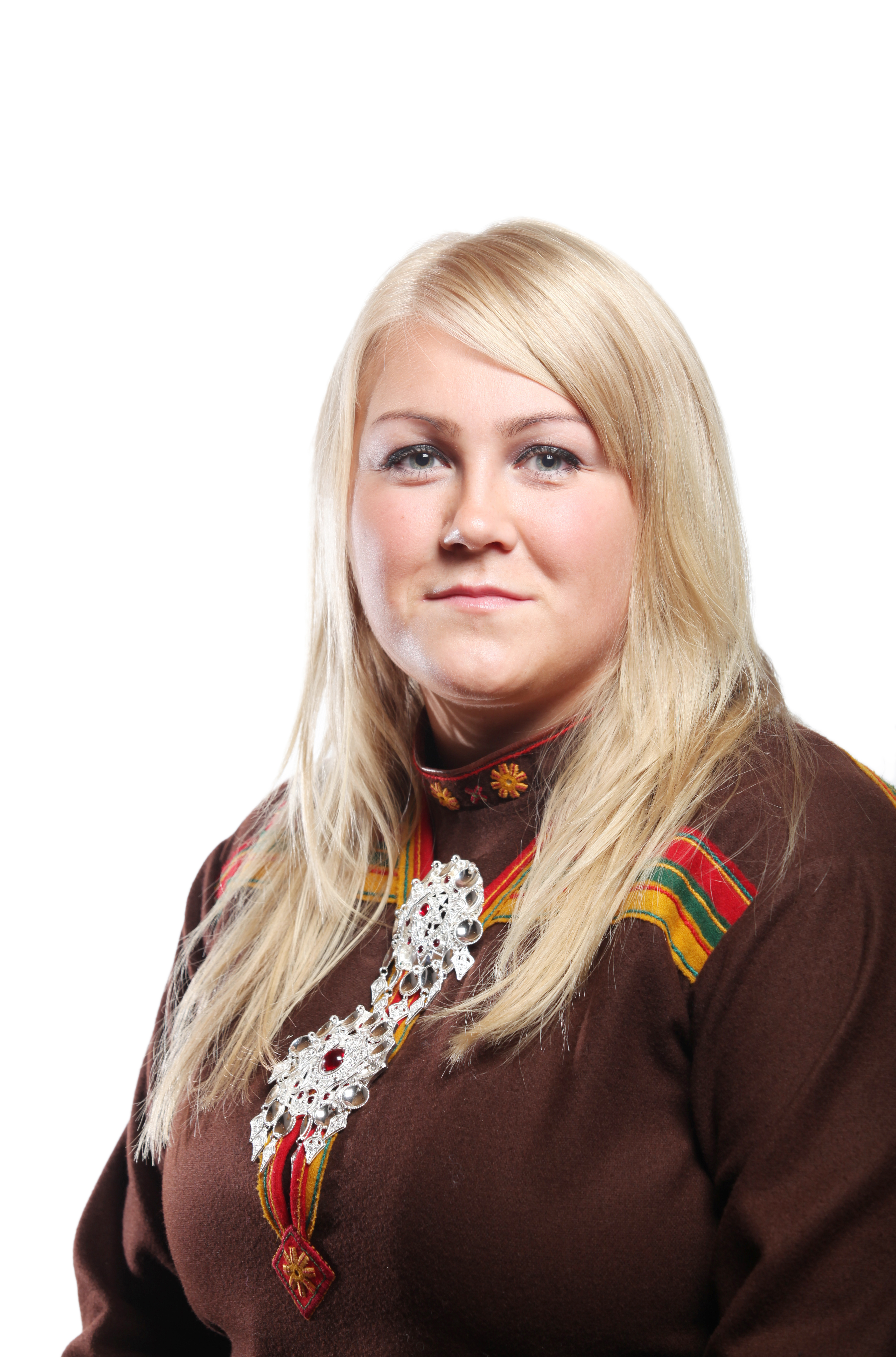 Medlem av oppvekst-, omsorg- og utdanningskomitéen. Foto: Kenneth Hætta / Sametinget